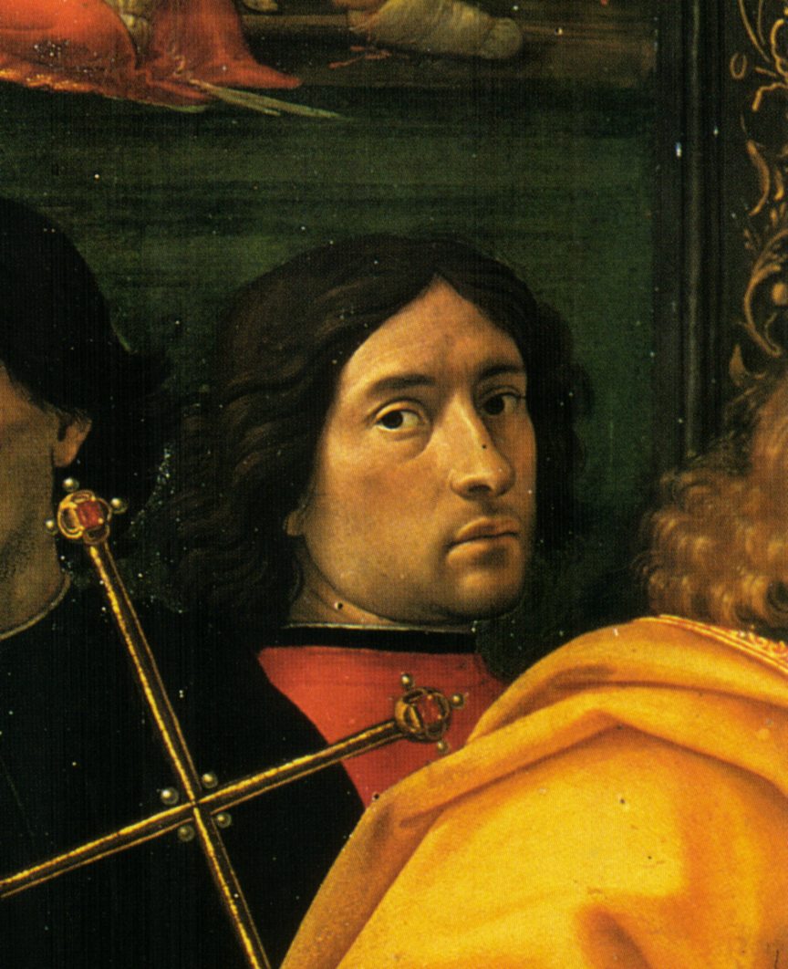 Autoritratto nell Adorazione dei Magi del 1488, Ospedale degli Innocenti, selfportrait.